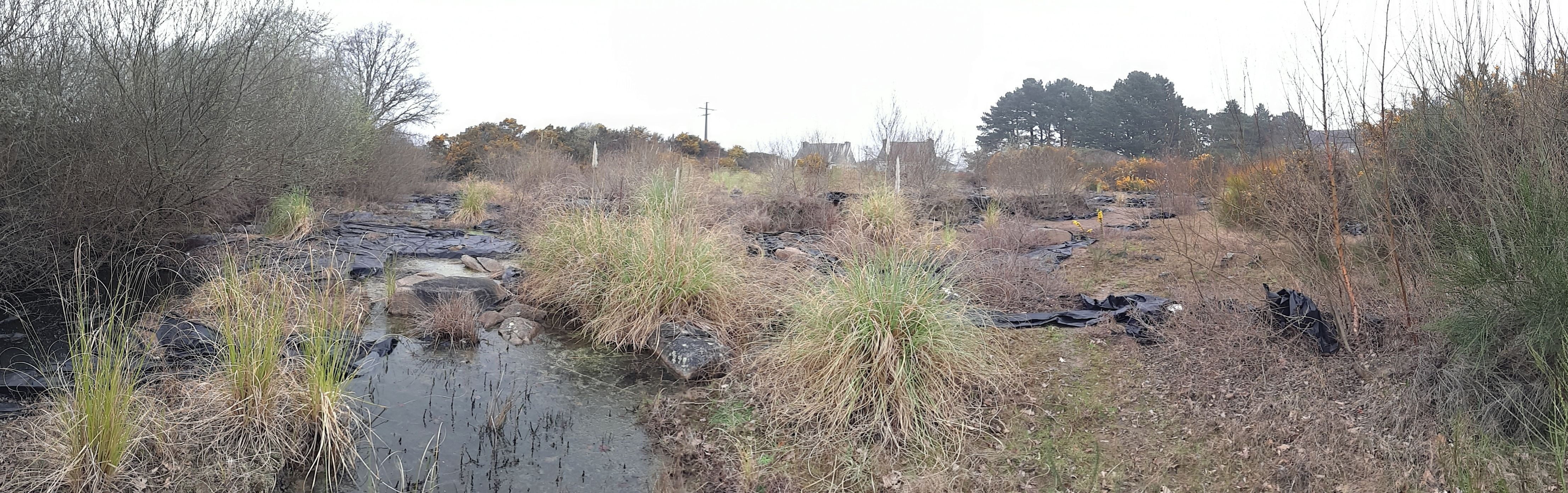 Photo panoramique du site de l'alignement de Kerdruellan montrant les pierres ayant été bâchées.